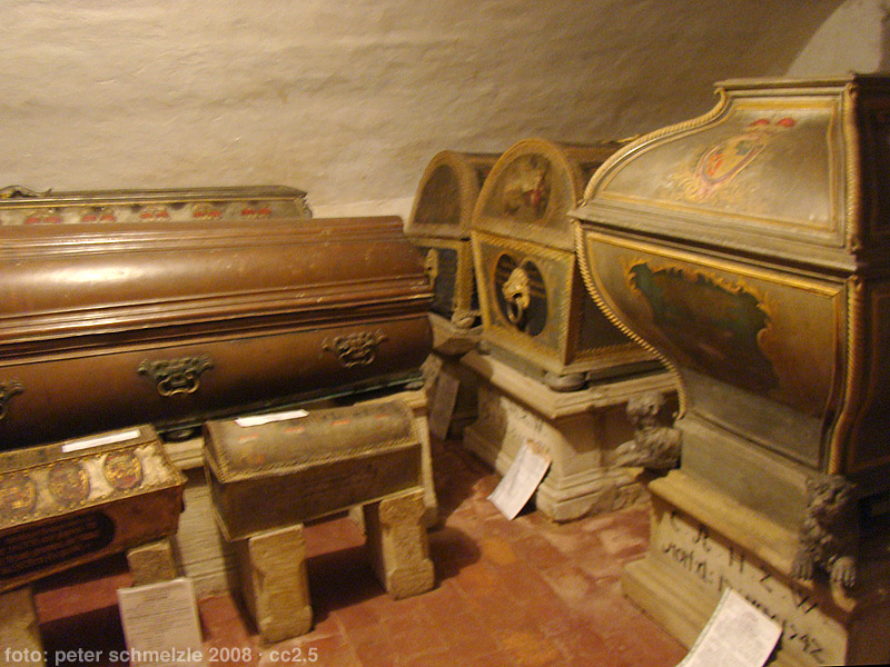 Blick in die 1701 erweiterte „Vordere Gruft“ der Gruft der Herzöge von Württemberg-Neuenstadt in der Nikolauskirche in Neuenstadt am Kocher